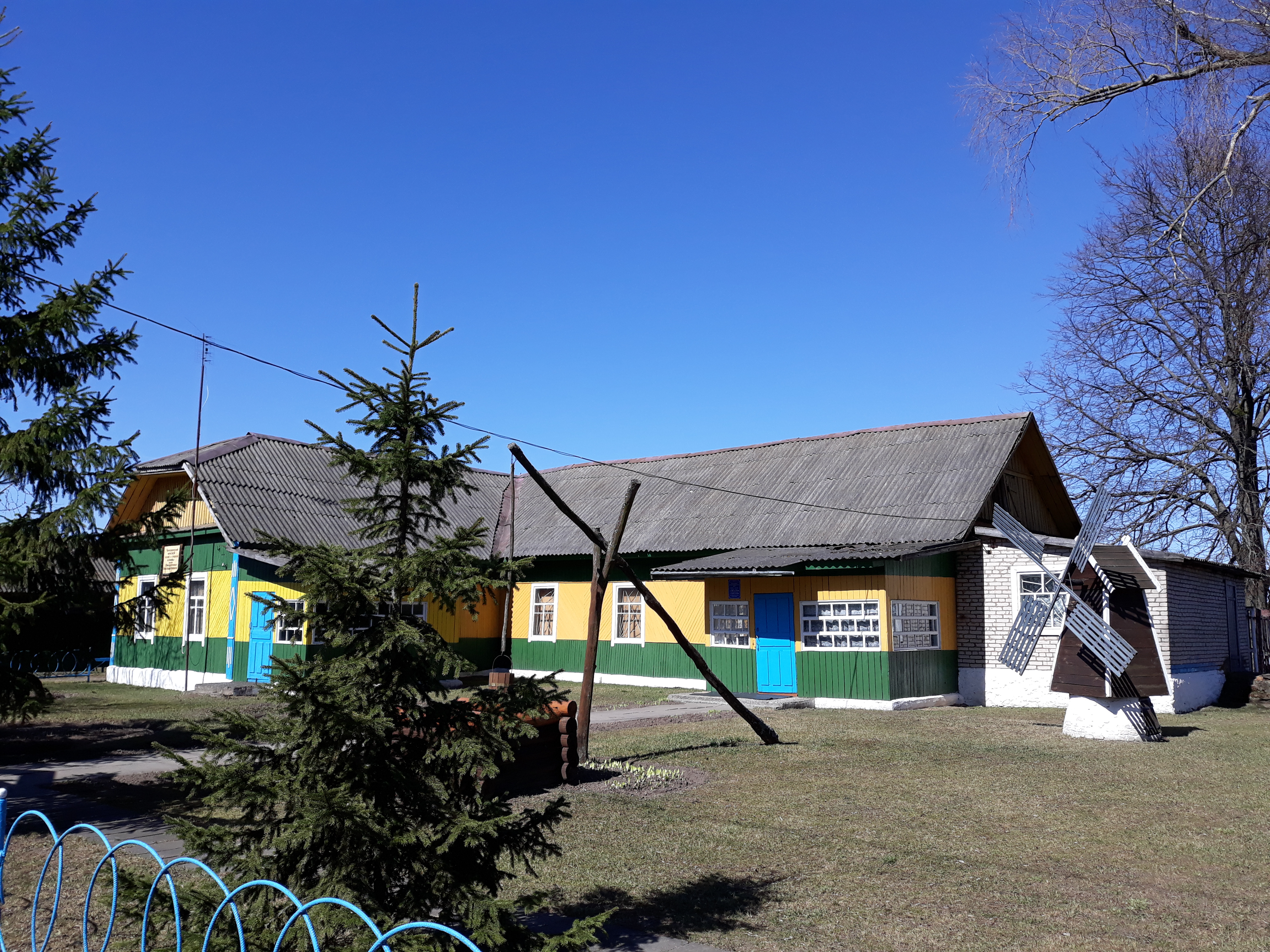 Музей ваеннай і працоўнай славы імя Пішчалава А.К.